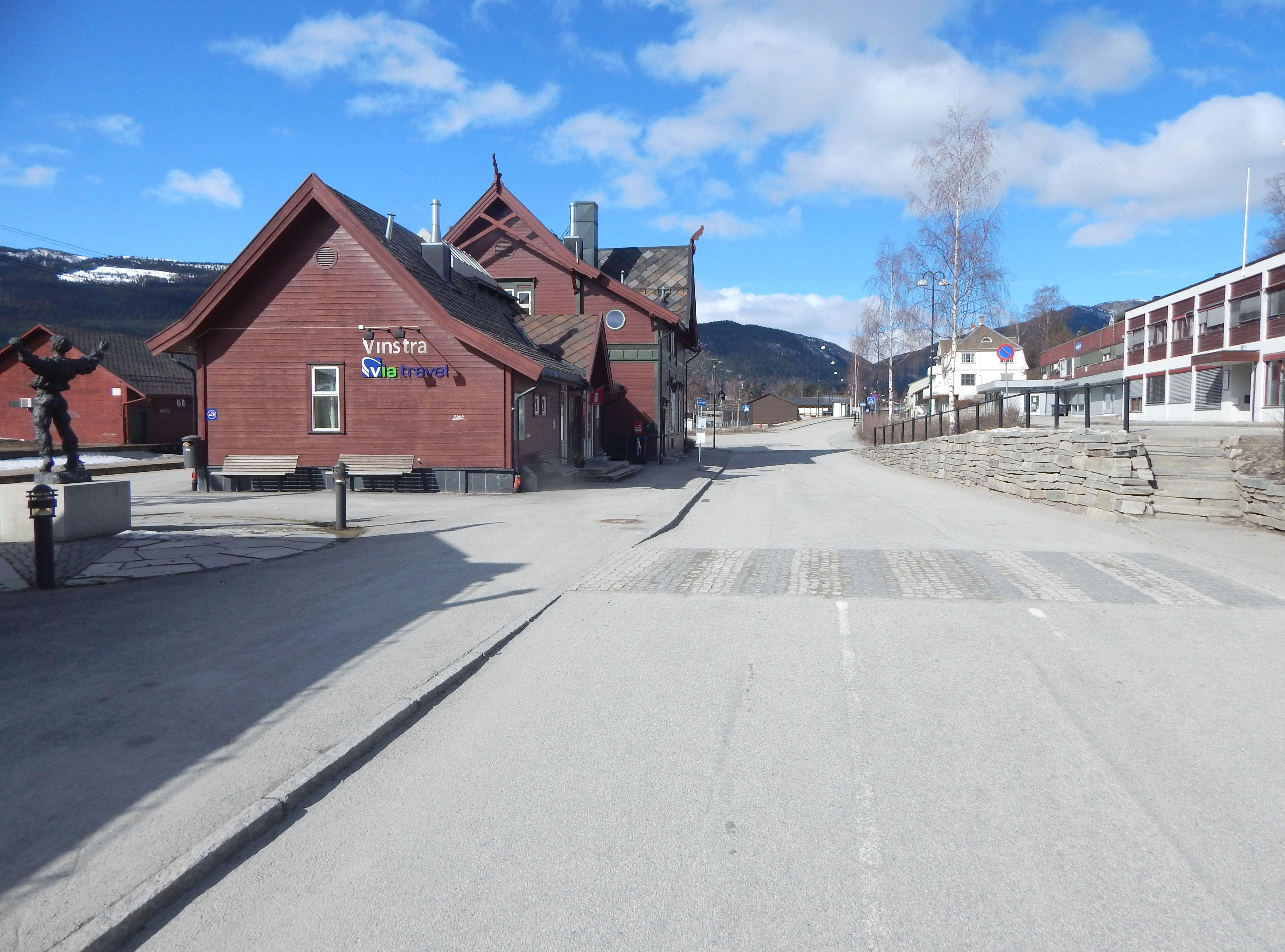 Fylkesvei 409 bak Vinstra stasjon